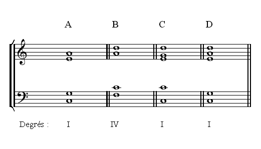 Description : Accord avec note ajoutée Source : Personnelle Licence : GFDL